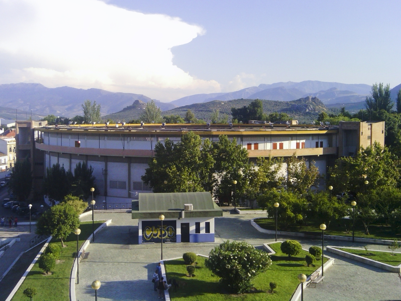 Plaza de Toros de Jaén.